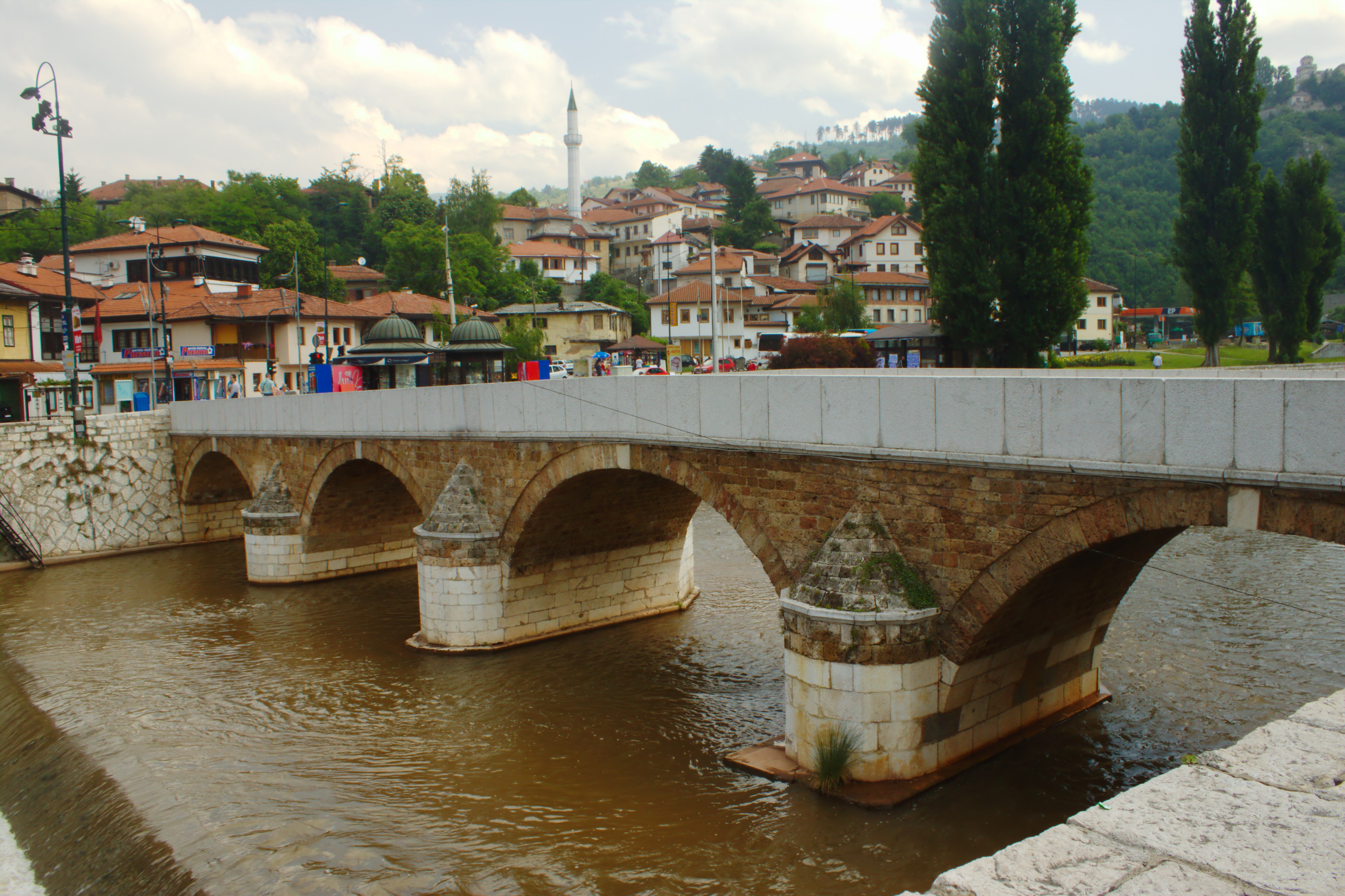 Sarajevo, most preko Miljacke.